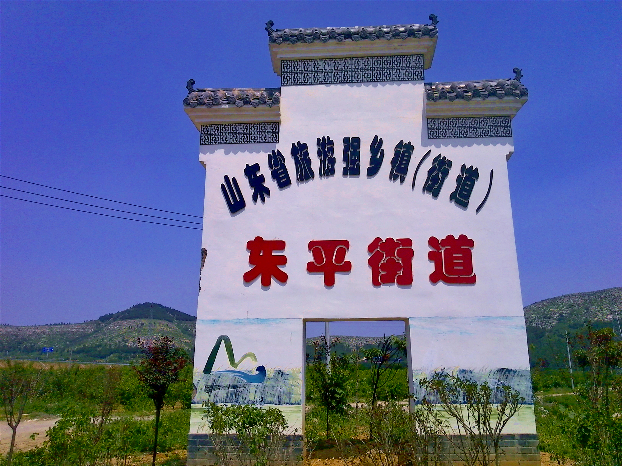 东平县东平街道